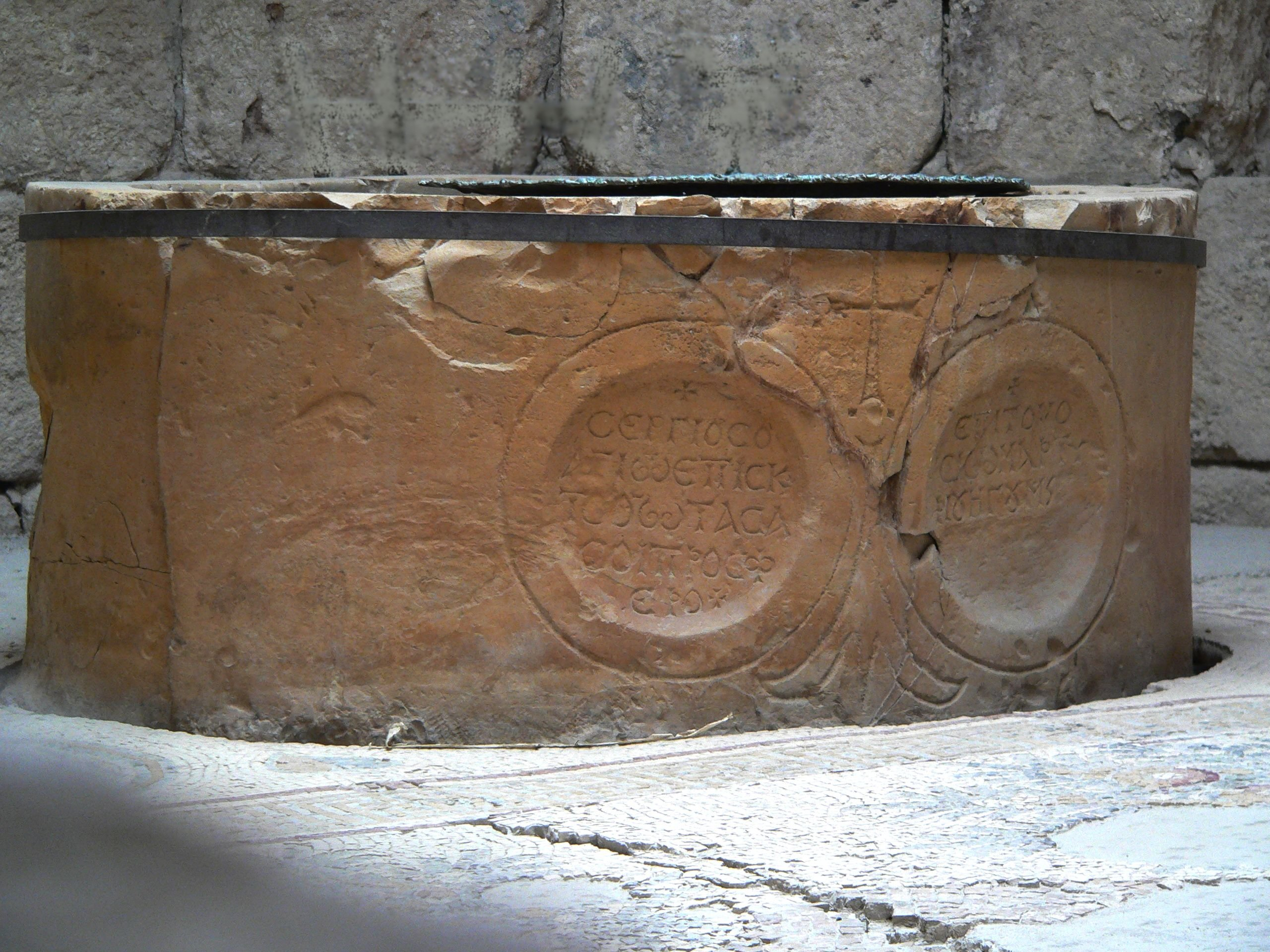 M Disdero 21/02/2007